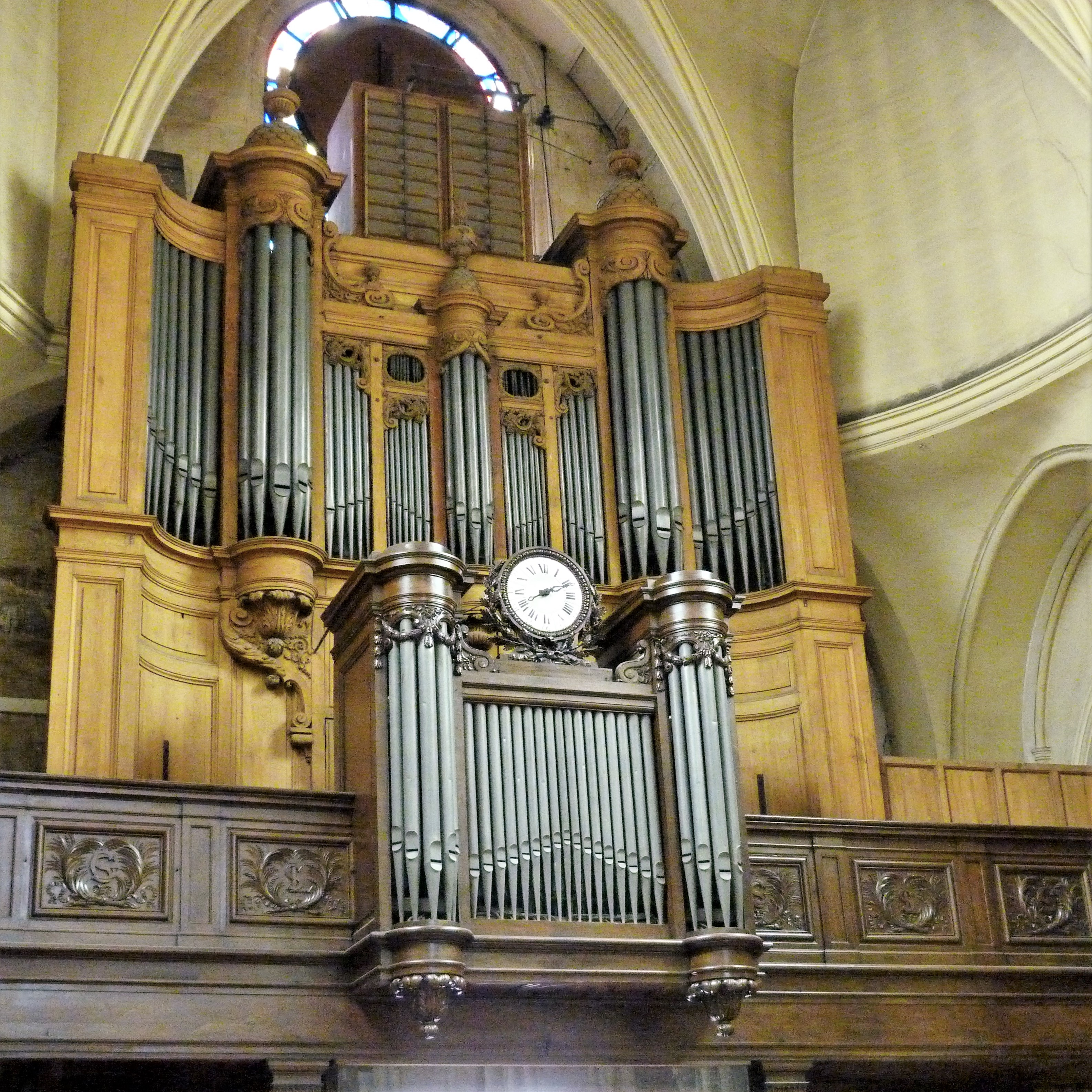 Buffet d'orgues de l'église Saint-Leu-Saint-Gilles, Paris (1er arrondissement). Facteur Clicquot (1788), Suret (1855), Mutin (1910).